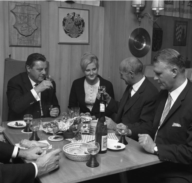 Empfang in der Landesvertretung Bayern